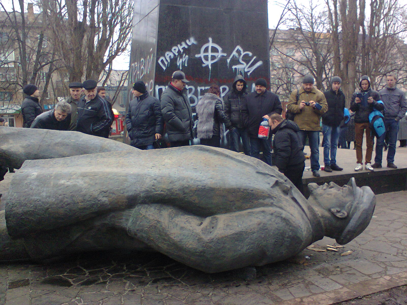 Повалений Ленін в Чернігові. Ранок 22 лютого 2014